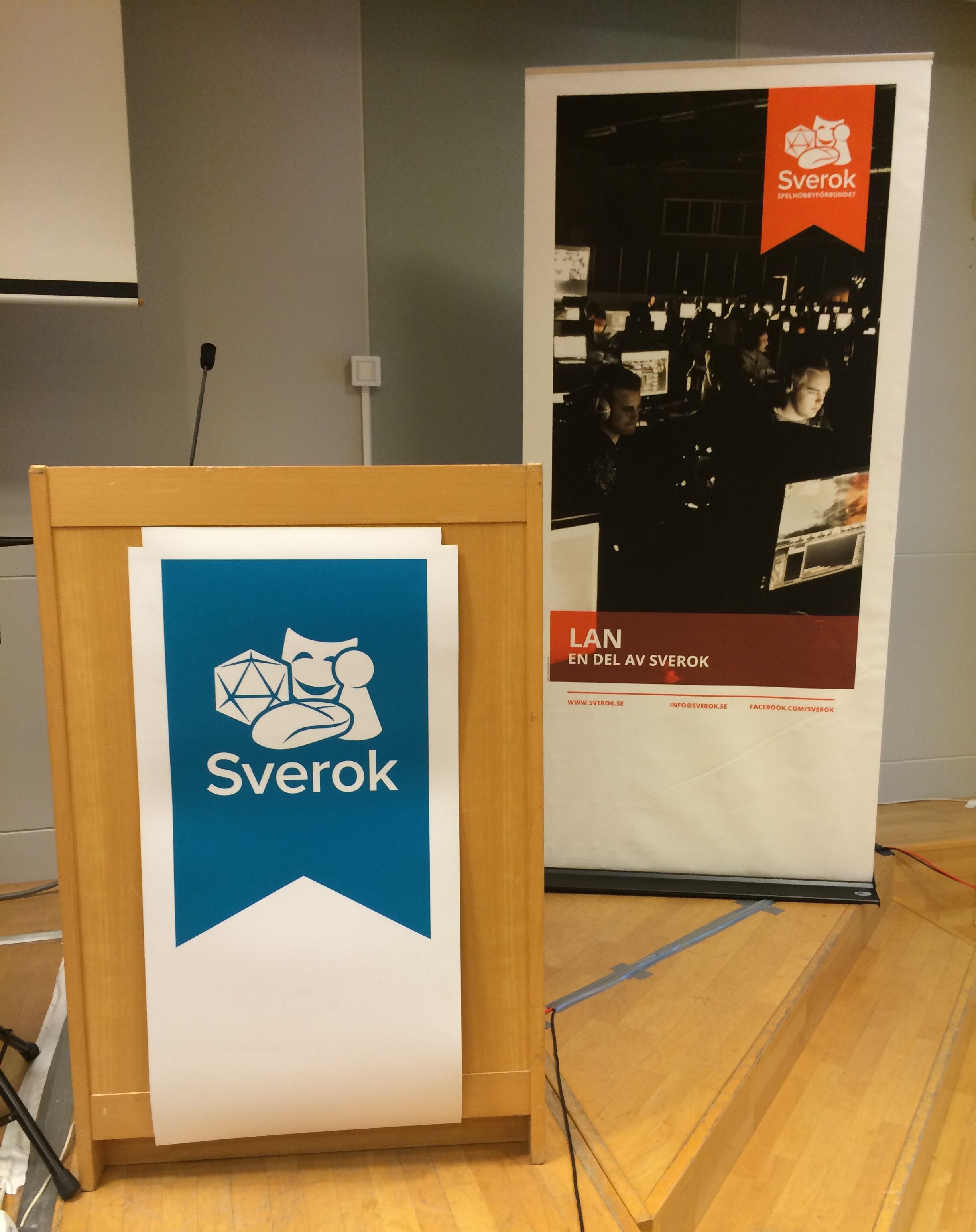 Sverok - spelhobbyförbundet